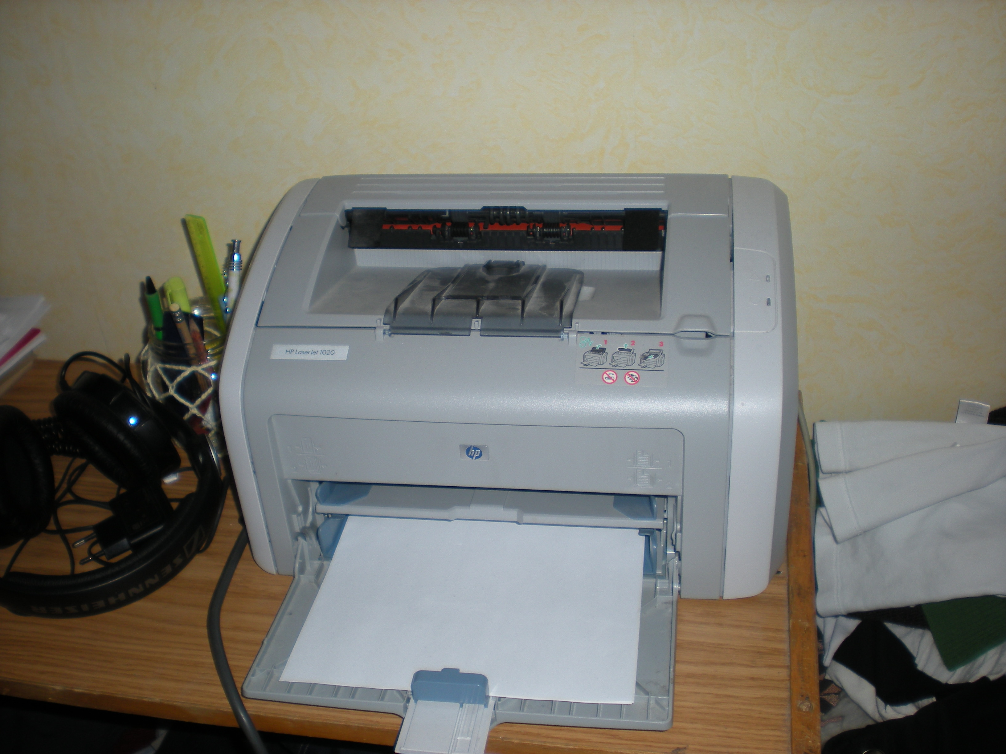 HP Laserjet 1020 laserprinter